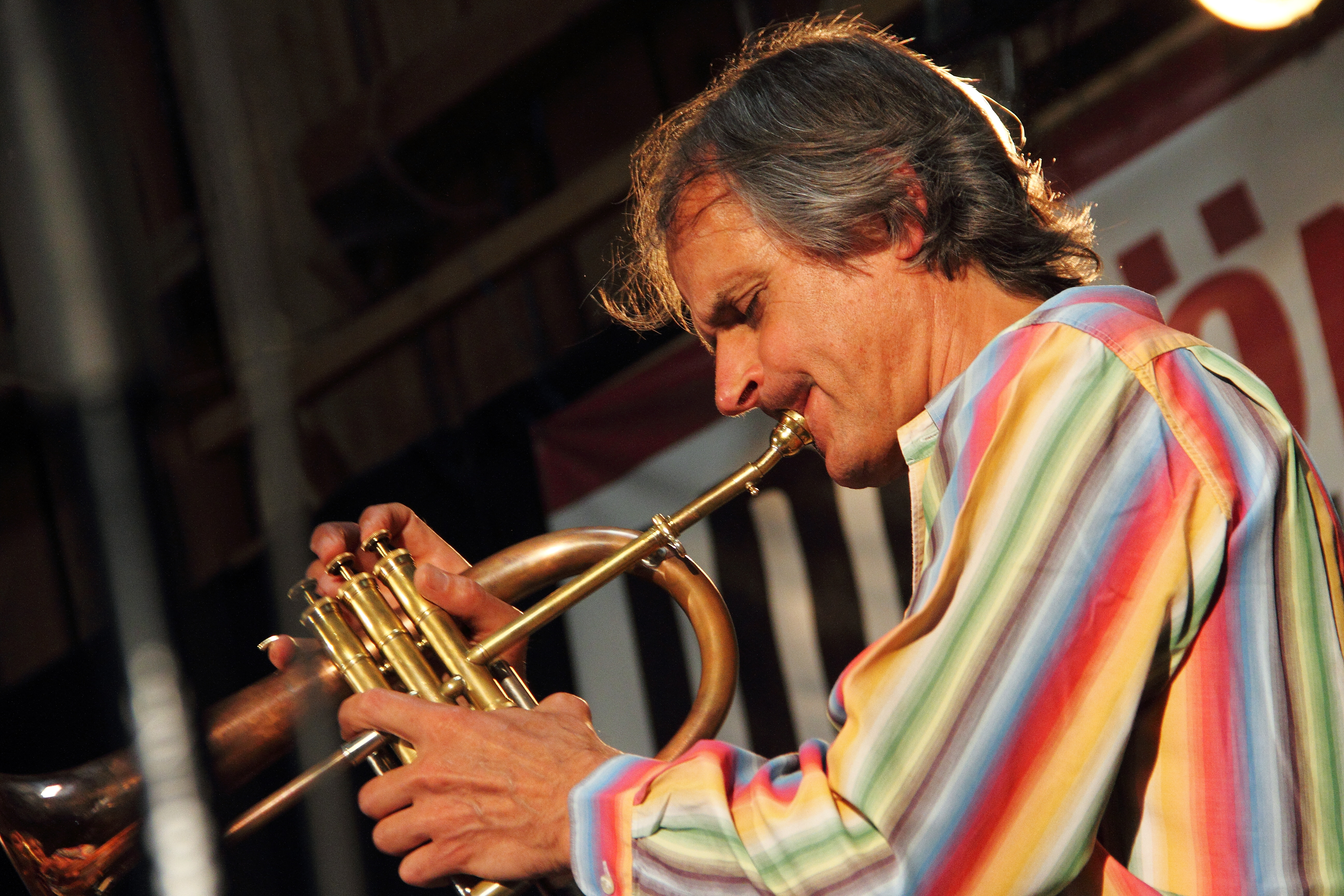 Markus Stockhausen und Florian Weber mit ihrem Projekt INSIDE OUT auf dem INNtöne Jazzfestival 2017.